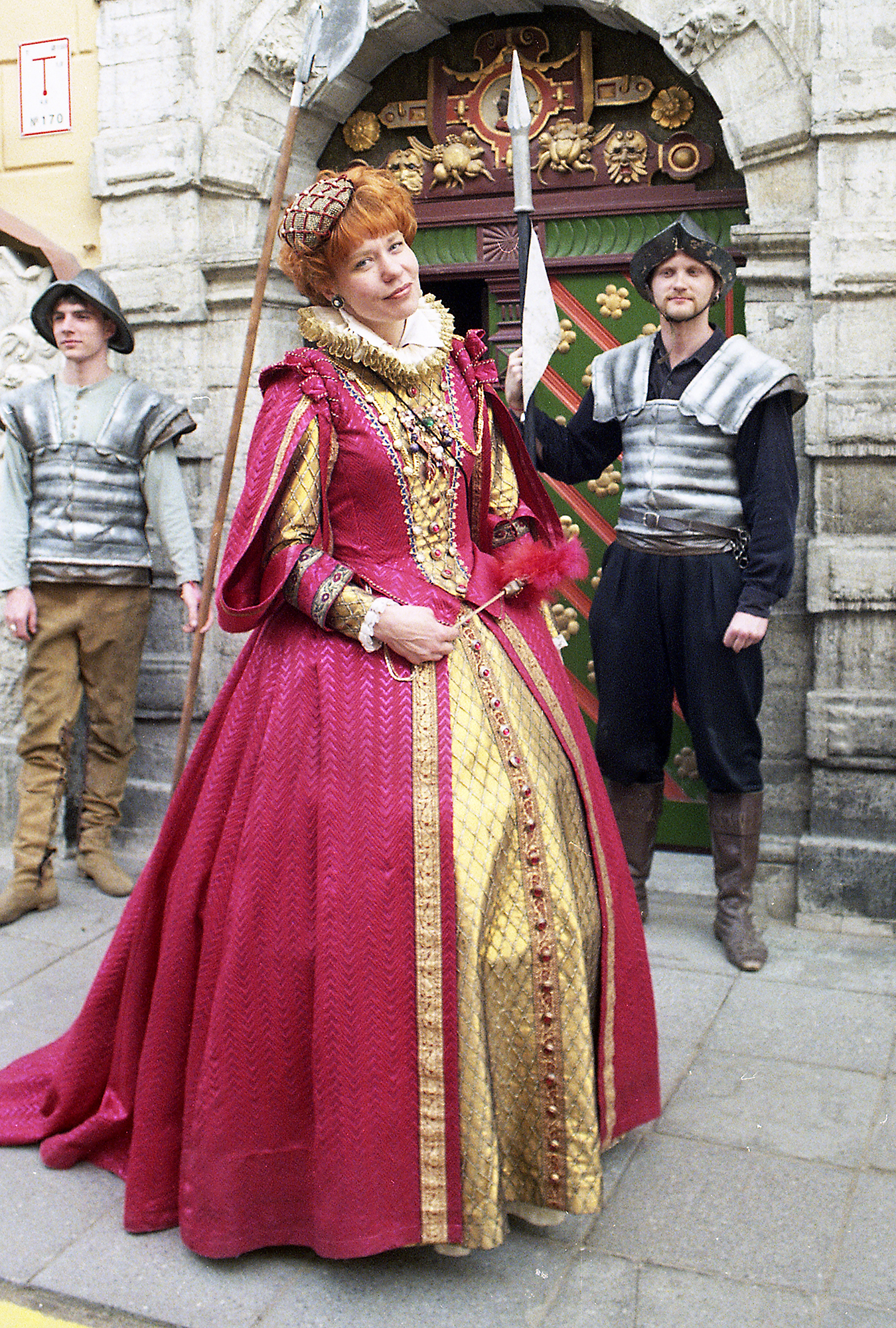 Signe Kivi, tekstiilikunstnik ja poliitik vanalinnapäevadel 99